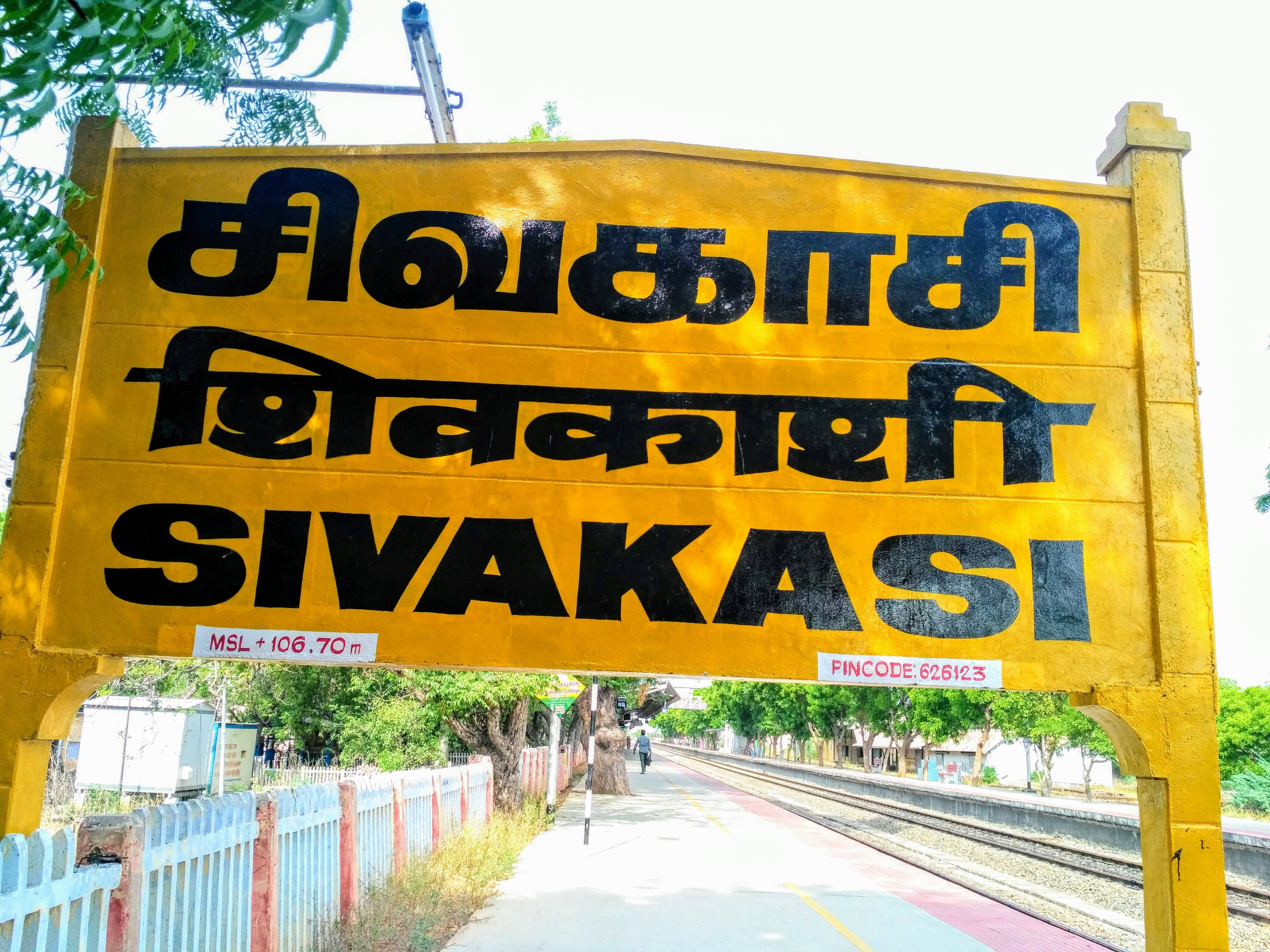 சிவகாசி இரயில் நிலையத்தில் எடுக்கப்பட்ட புகைப்படம்